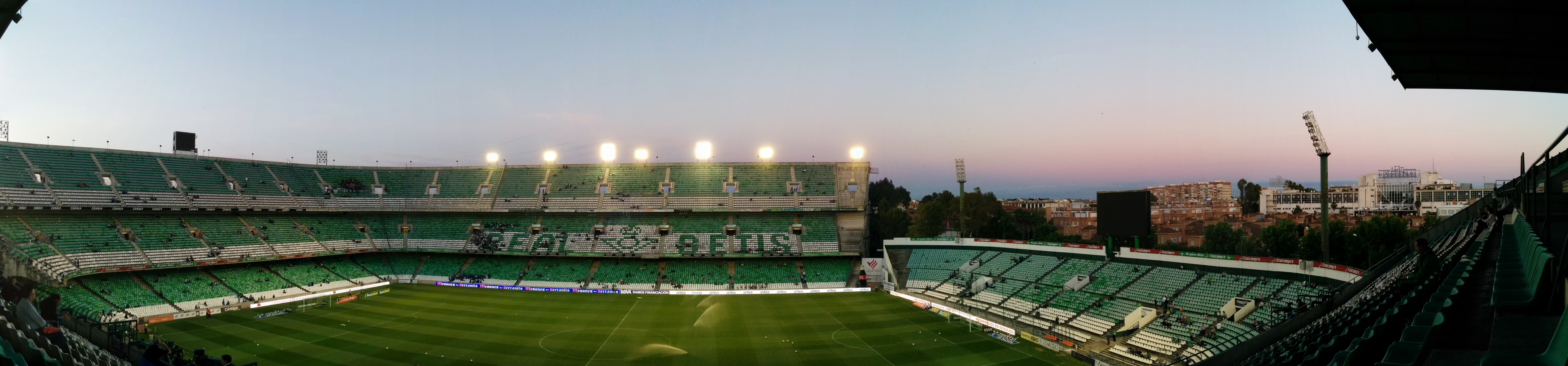 Panorámica, Estadio Benito Villamarín